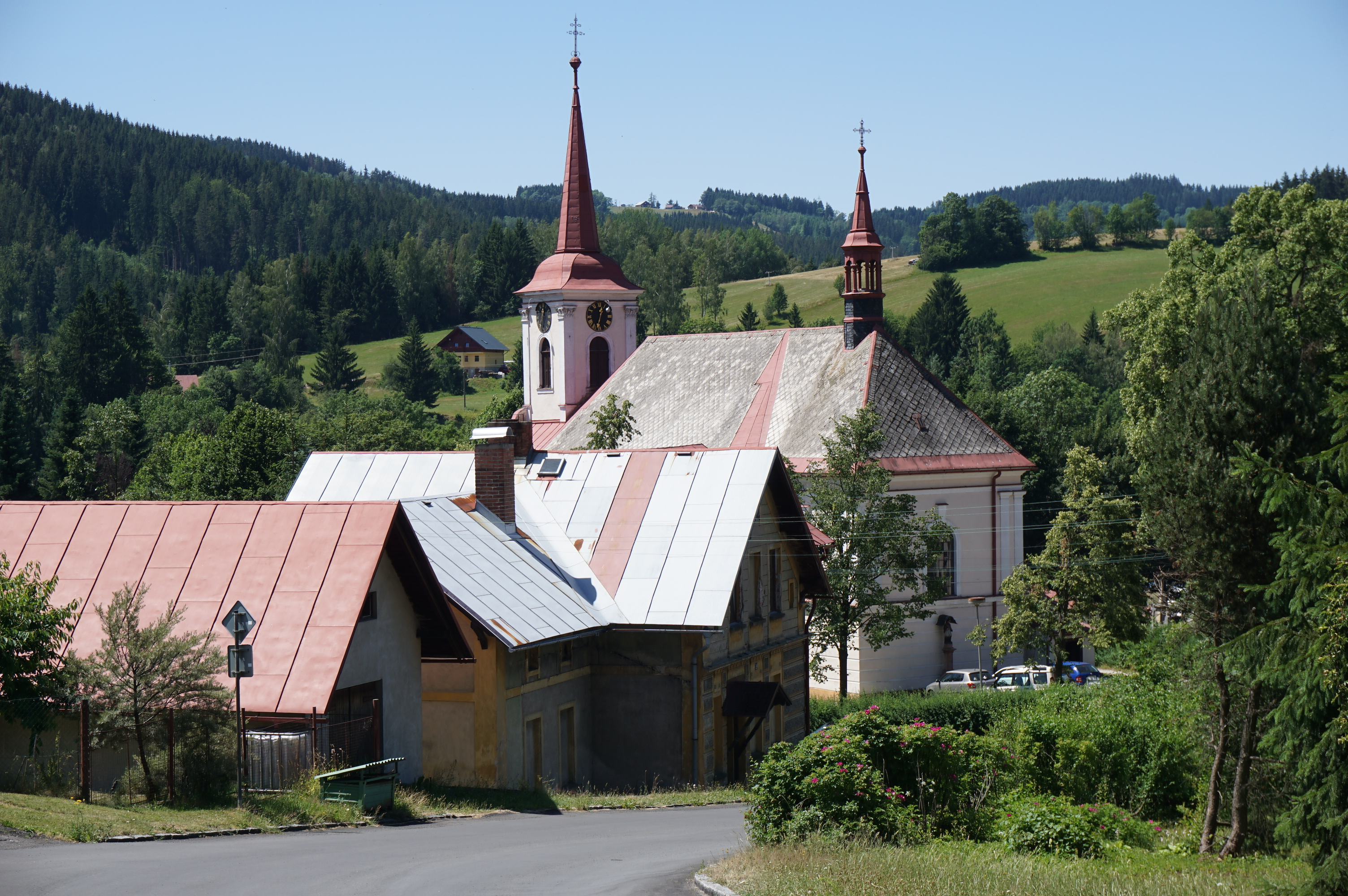 Jablonec nad Jizerou - celkový pohled od severovýchodu s dominantou kostela sv. Prokopa